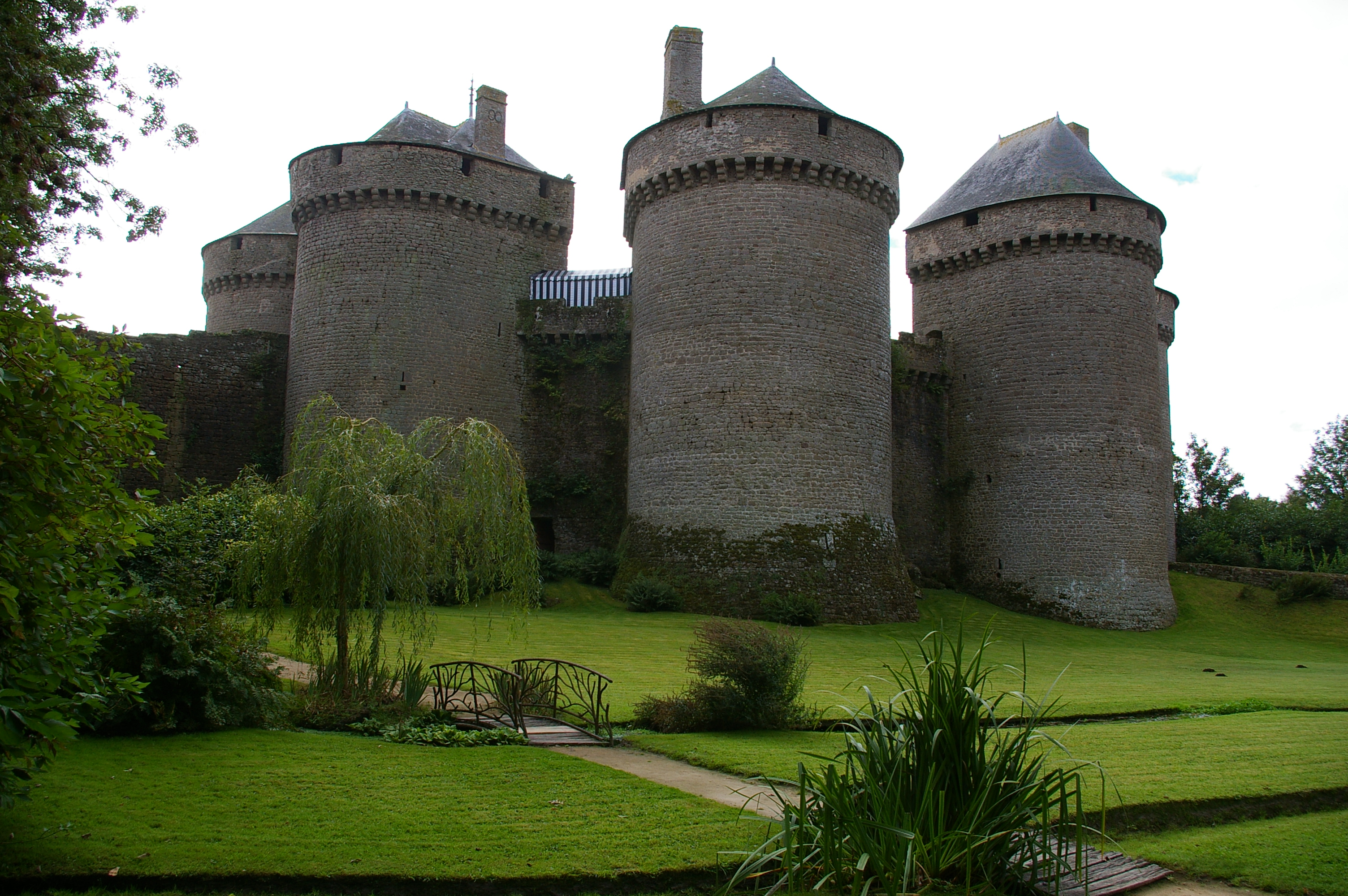 Château de Lassay (Mayenne)